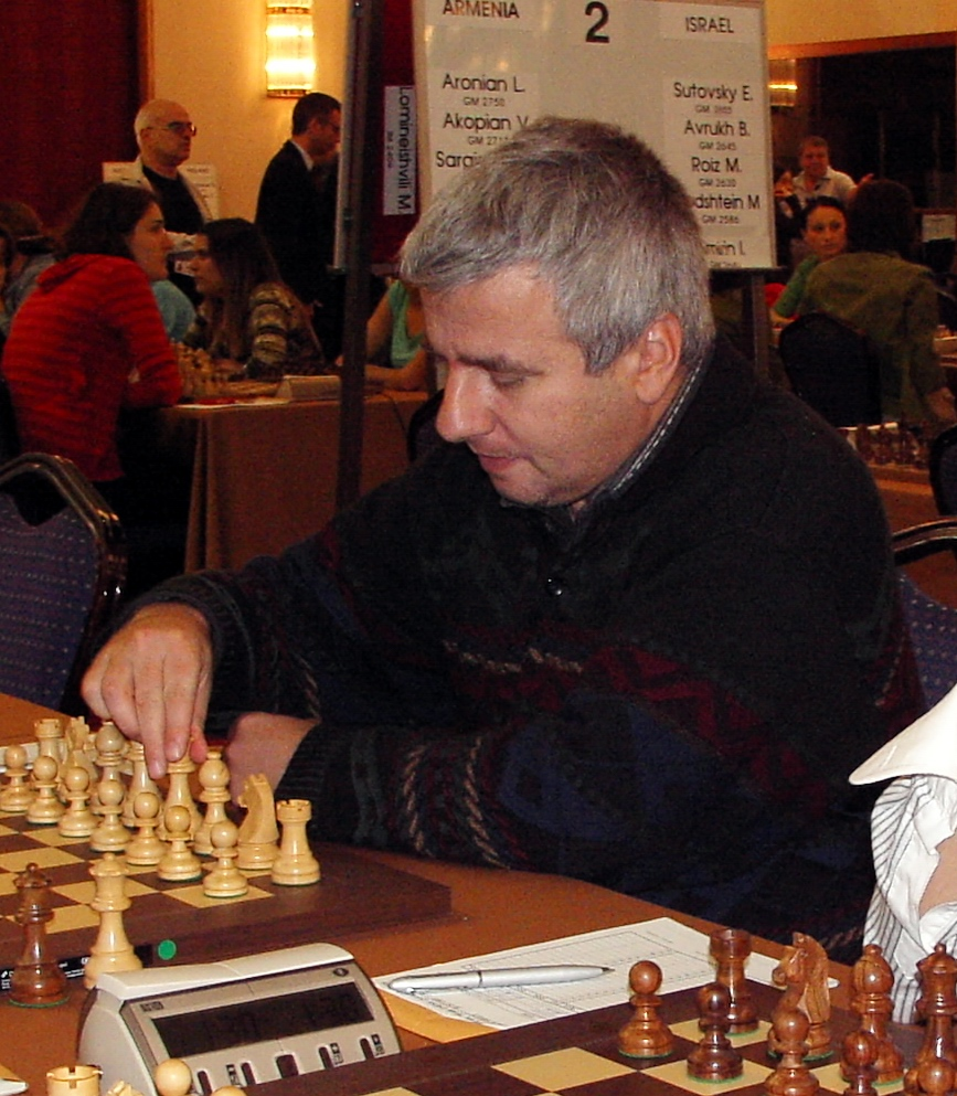 GM Kiril Georgiev Bulgaria, EuroChess Iraklion 2007